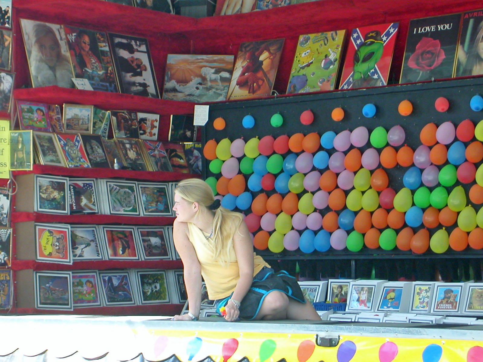 arlington, va 8-03